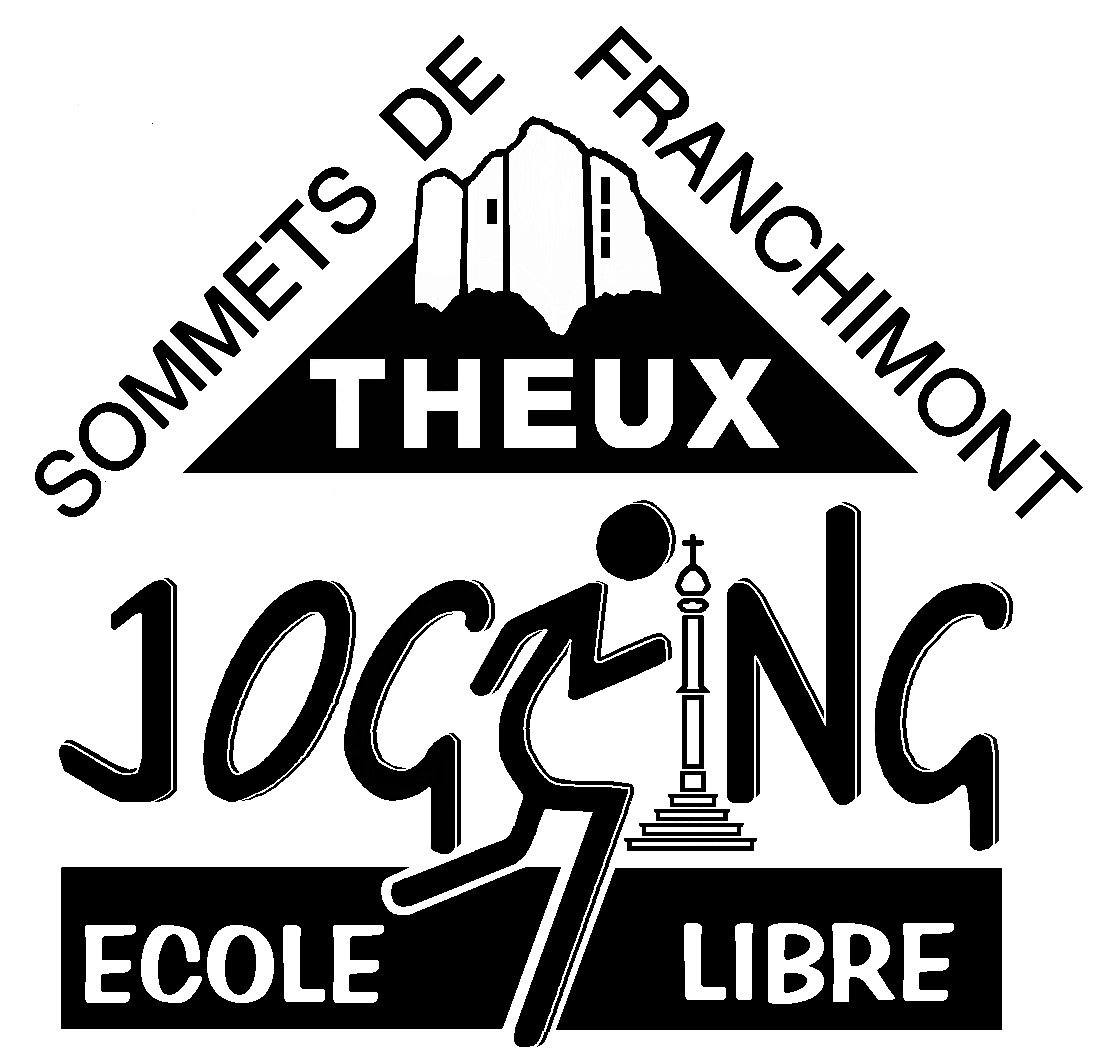 Le logo du jogging des "Sommets de Franchimont" (Theux, Province de Liège, Belgique), a évolué au fil des ans, depuis sa création en 1992 par José Delfosse. Ma version retravaillée en date du 14 février 1998 diffère de l'image originale par une modification des polices de caractère utilisées pour le texte, la mise en relief du mot "jogging", l'insertion du dessin du perron de Theux à la place de la lettre I et l'ajout du château de Franchimont au sommet du triangle. Elle sera à nouveau utilisée pour l'édition 2016 des 24e "Sommets de Franchimont".